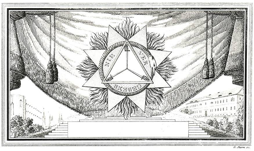 Festurkunde von G. Sturm, um 1800